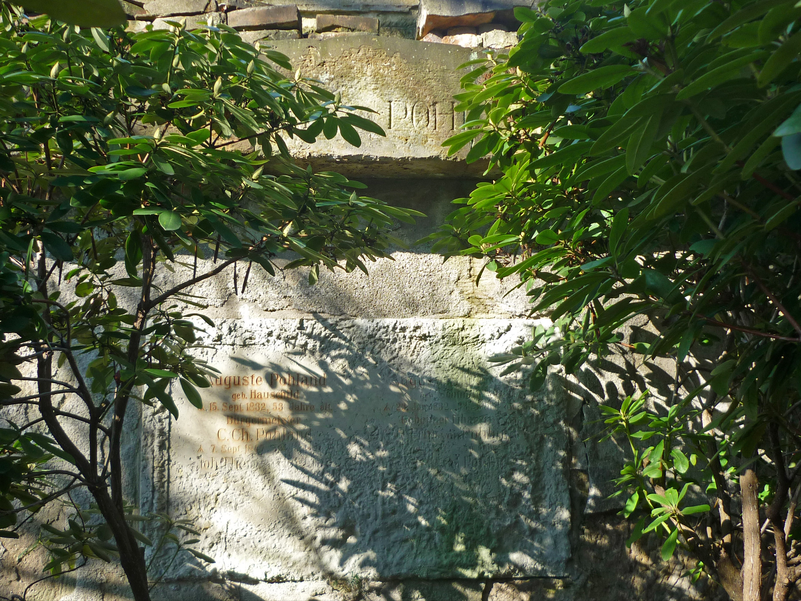 Grabstätte des Bürgermeisters Carl Christian Pohland (1769–1847) auf dem Trinitatisfriedhof in Dresden